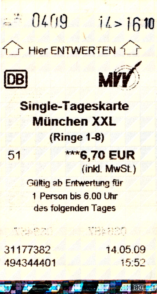 Münchner Verkehrsverbund (MVV), S-Bahn, Single Tageskarte München XXL, Automatenkarte, 2009 mit Entwertungsaufdruck